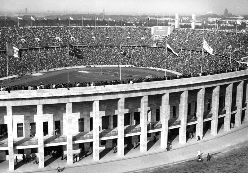 Berlin Olympiade 1936